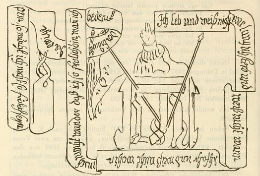 Abzeichnung der Darstellung der Priamel Ich leb und waiß nit wie lang im Deckengewölbe der Franziskanerkirche Heilbronn aus der Chronik Künzels